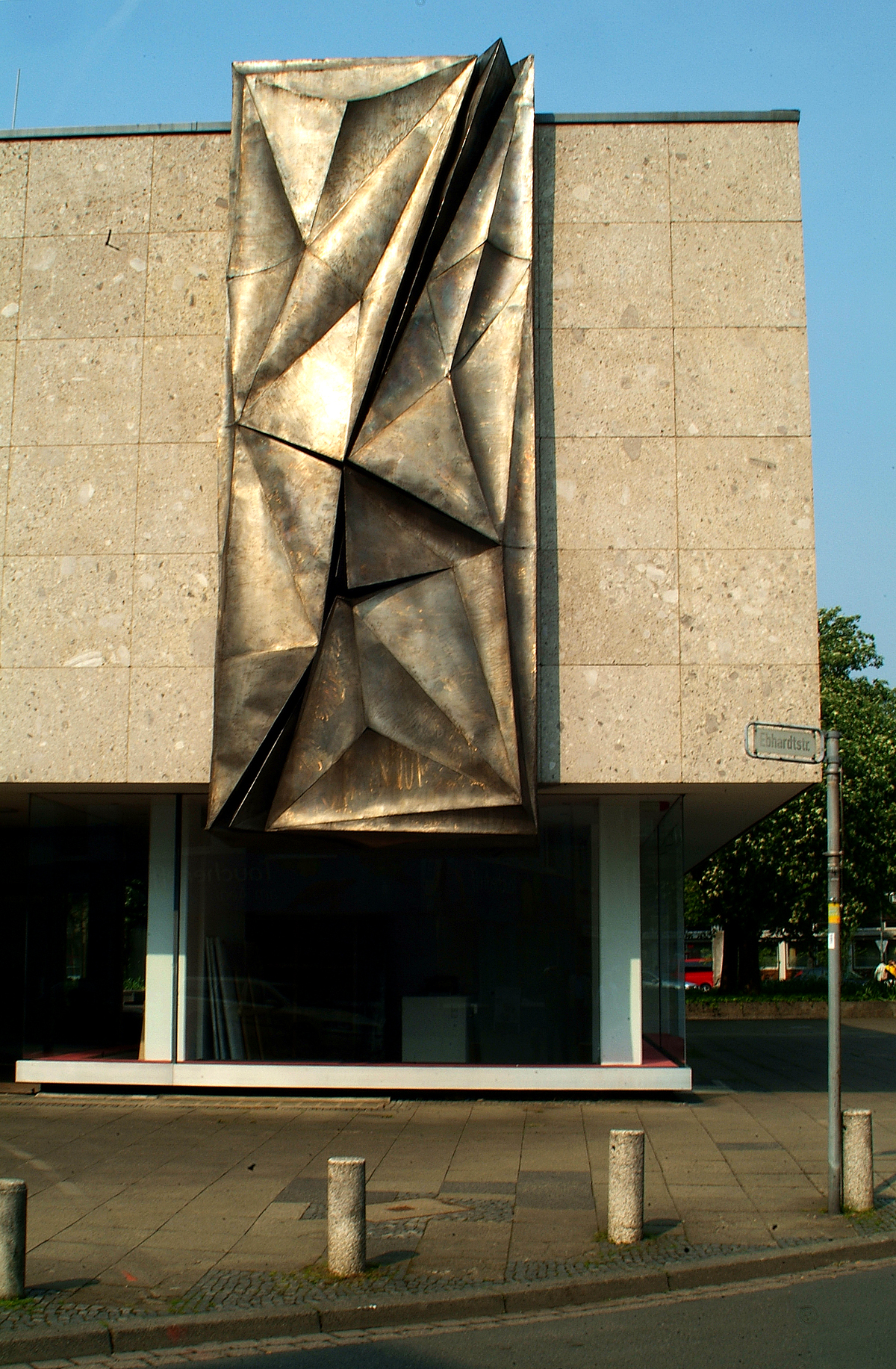 Sie haben aussagekräftigere, bessere, ergänzende Bilder? Sogar ein historisches Dokument? Zeigen Sie' s uns. Stiften Sie es Ihren Kindern, unseren Enkeln, allen Menschen.